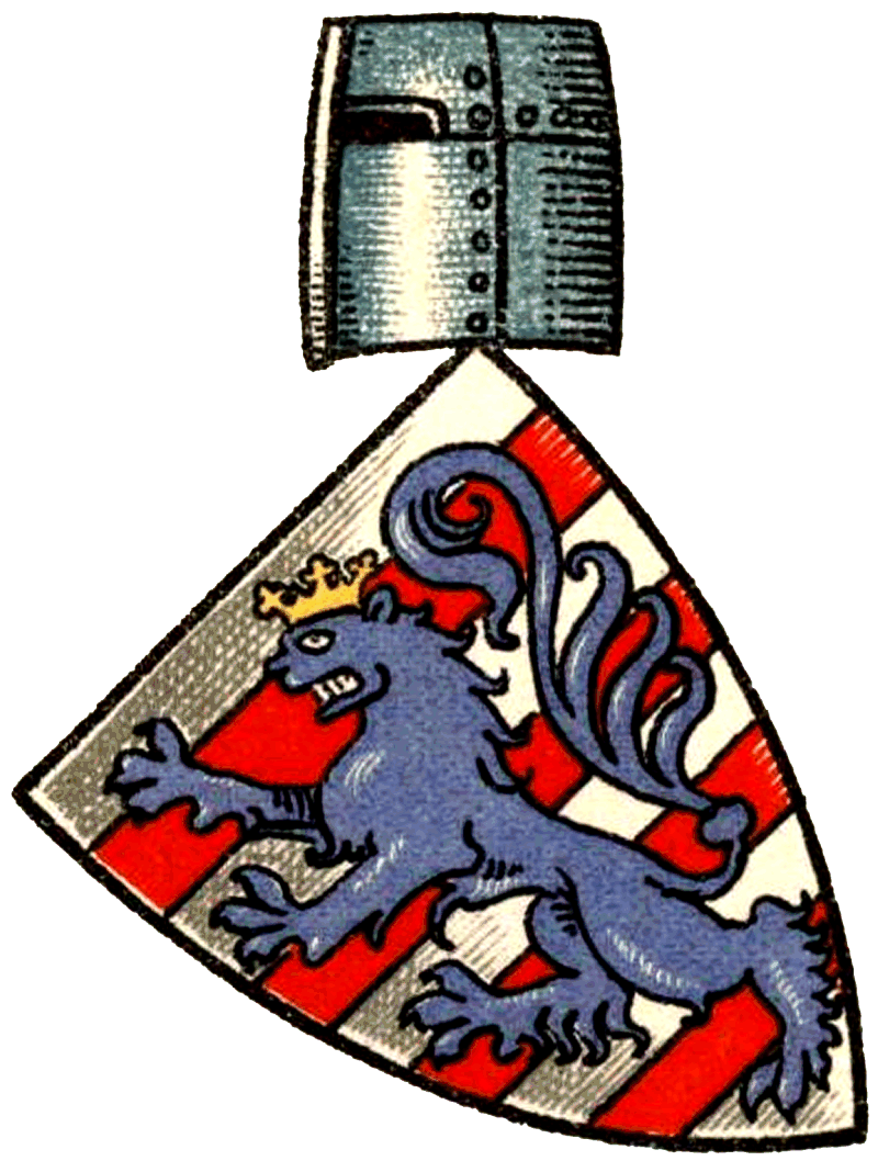 Wappen der Schulte / Schultheiß von Soest aus dem Geschlecht der Wolff von Lüdinghausen / von Lüdinghausen genannt Wolff